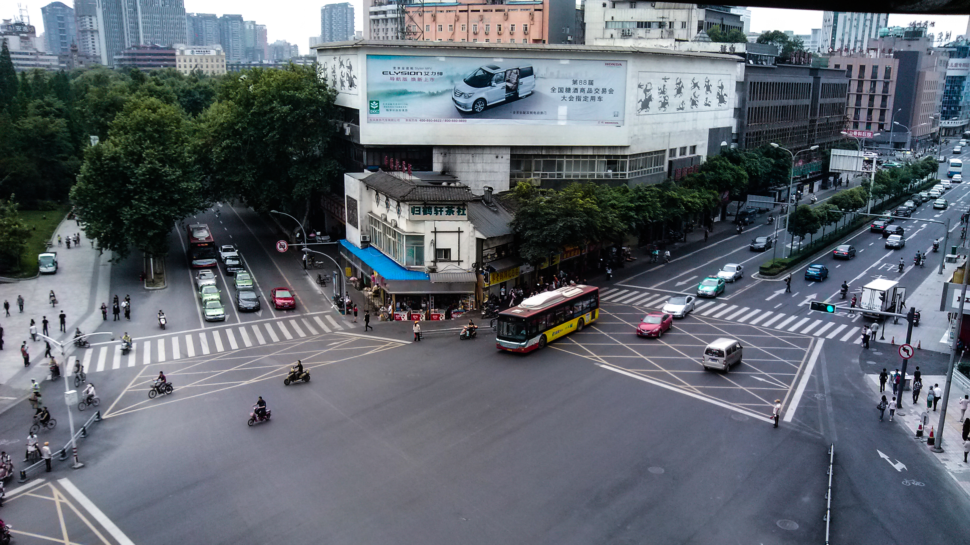 东城根街祠堂街口